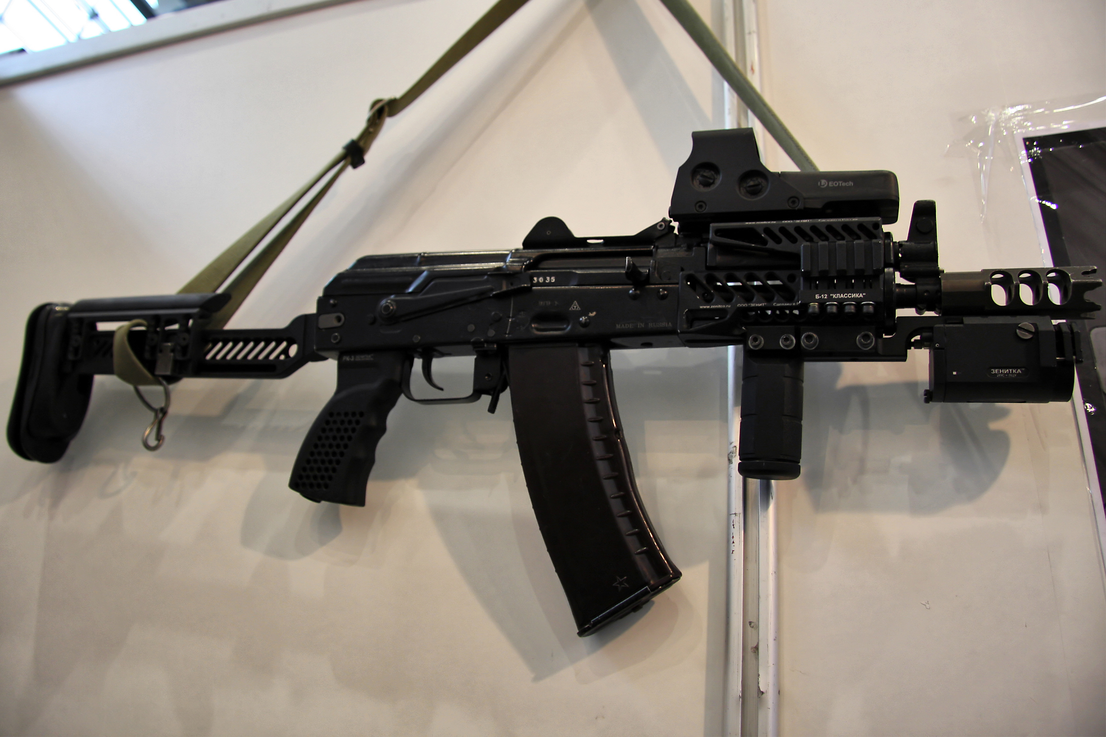 Тюнинг АК от компании Зенит (AK tuning from Zenitco)